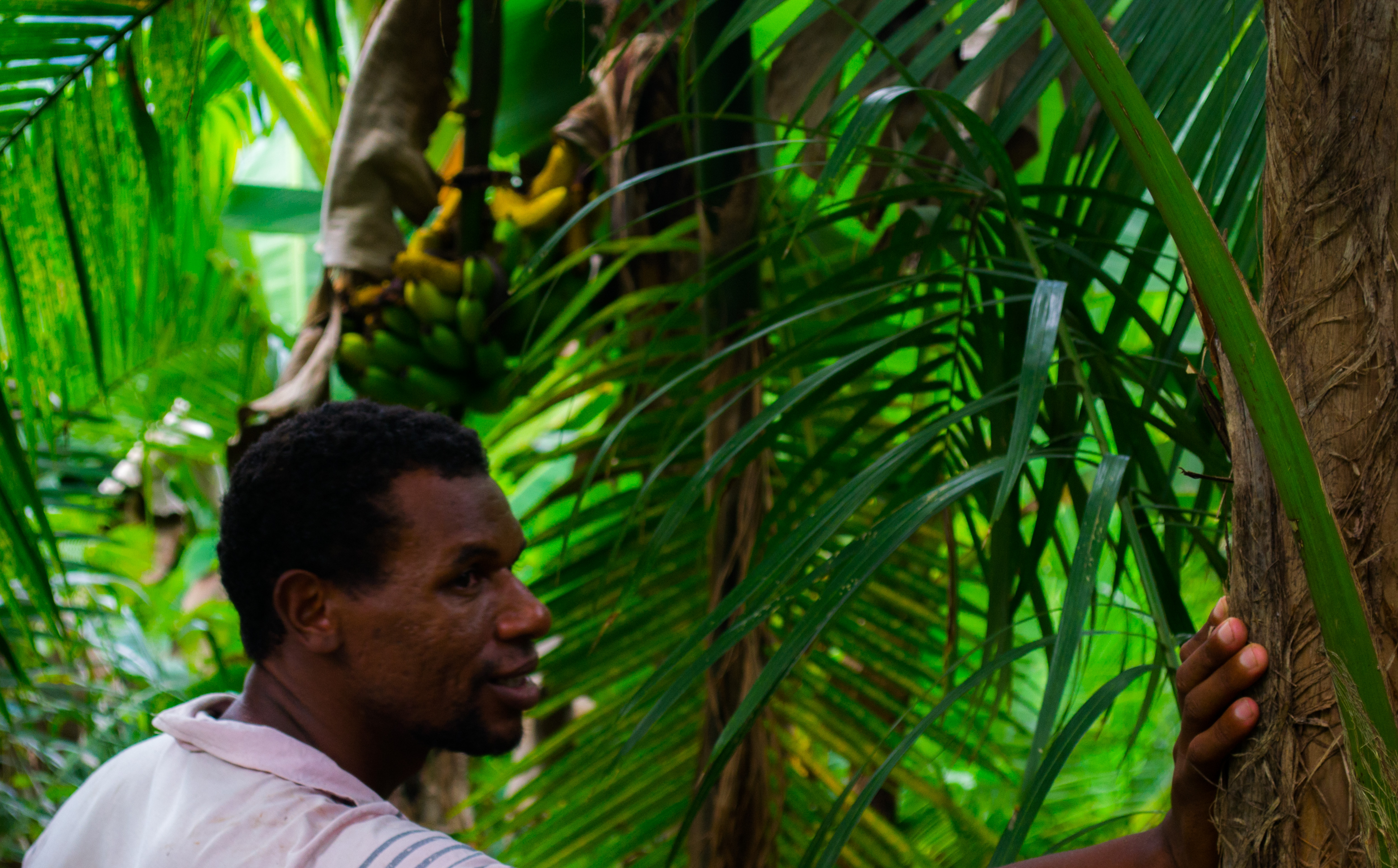 Pato e sua agrofloresta na Reserva de Desenvolvimento Sustentável Quilombos da Barra do Turvo, mosaico de unidades de conservação do Jacupiranga, sul do Estado de São Paulo.